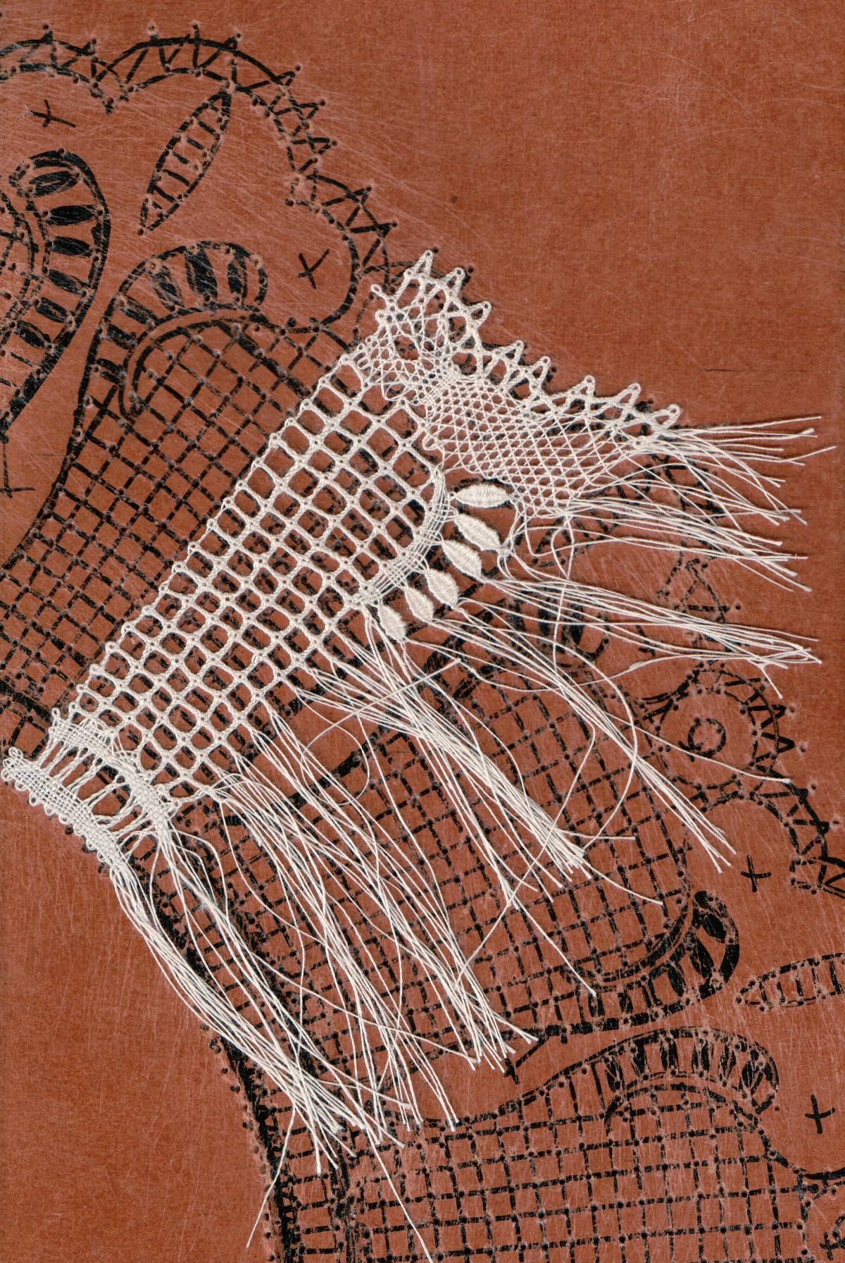 Klöppelspitze, Entwurf der deutschen Spitzenklöpplerin Leni Matthaei, ausgeführt von Christa Zimmermann